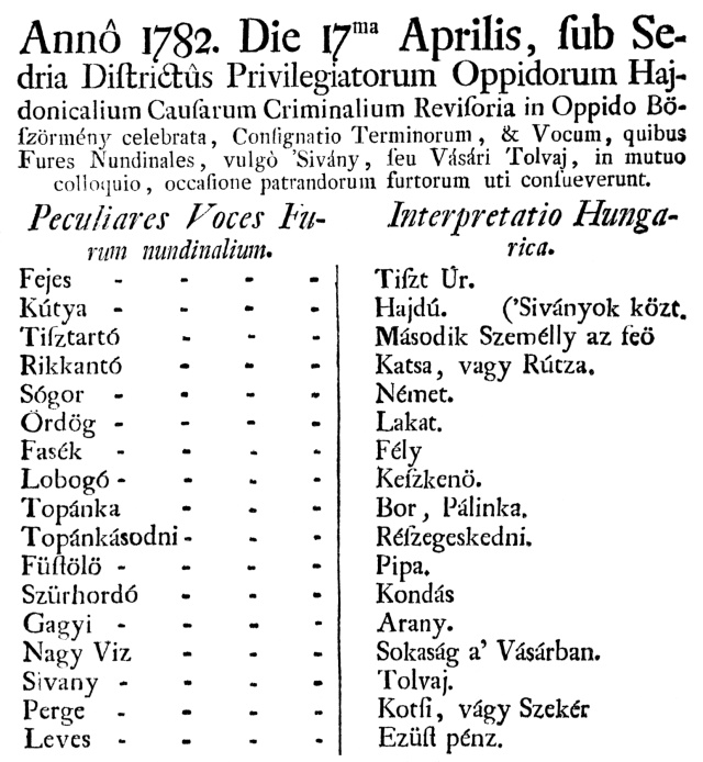 Részlet az Országos Helytartótanács 1782-es egyik körlevelének mellékletéből, cím és a zsiványnyelvi szójegyzék első szavai (Hajdúsági szójegyzék)